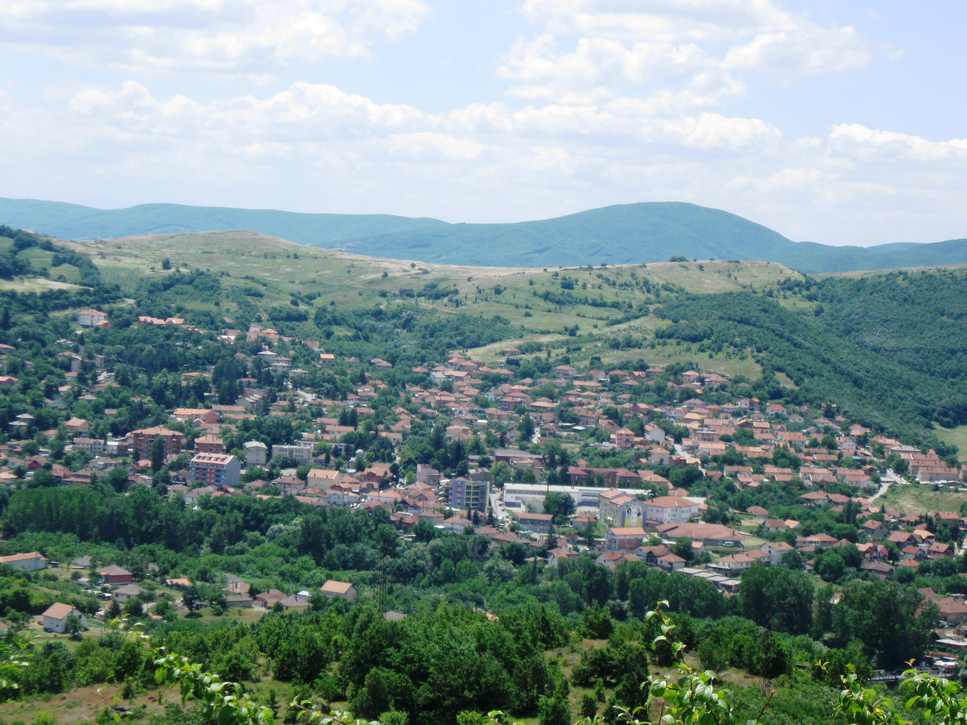 снимак Радосава Стојановића